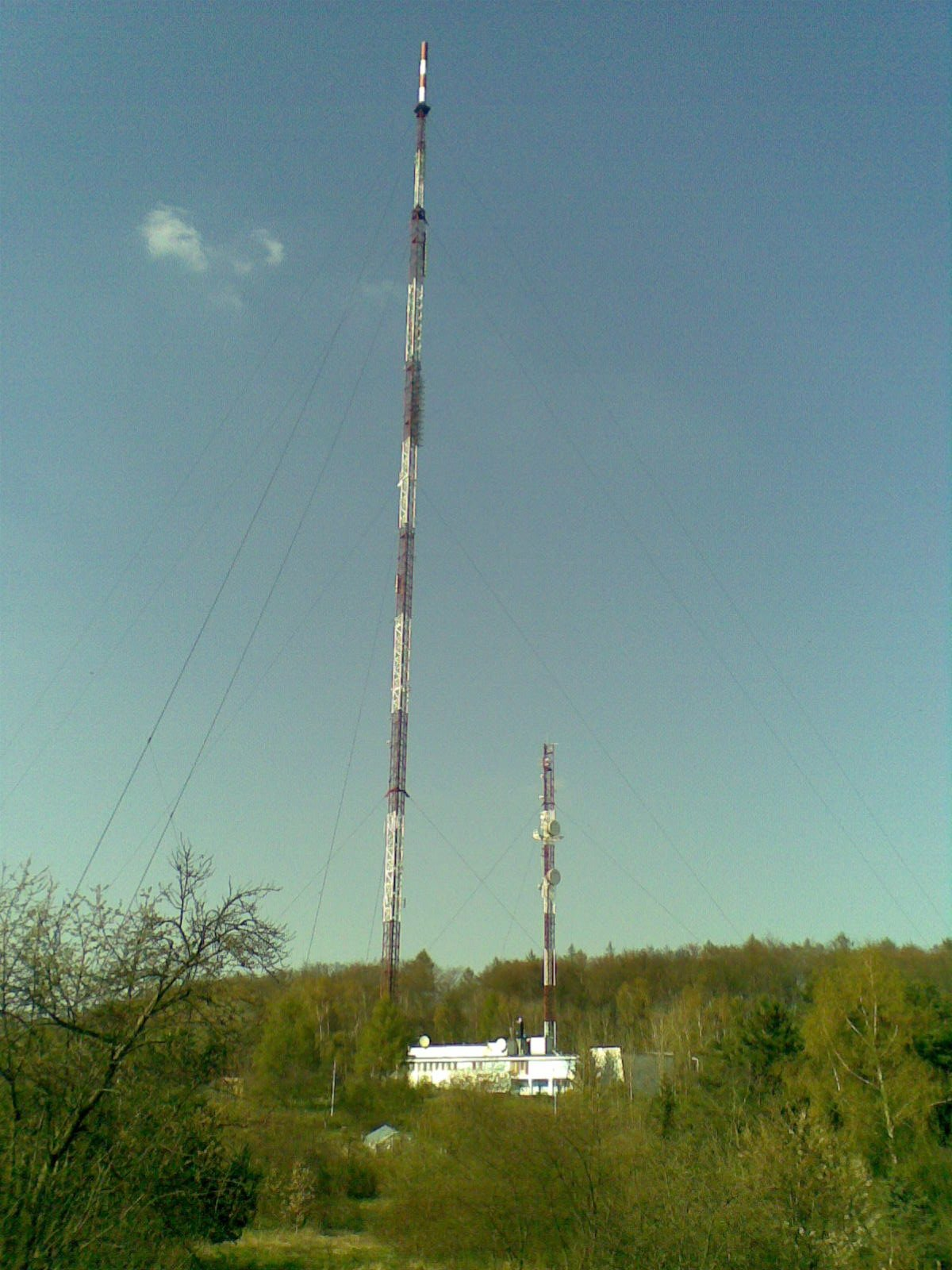 Radiowo-Telewizyjne Centrum Nadawcze w Kołowie